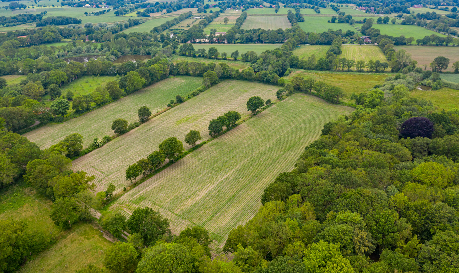 Wallheckenlandschaft am Upstalsboom in Ostfriesland